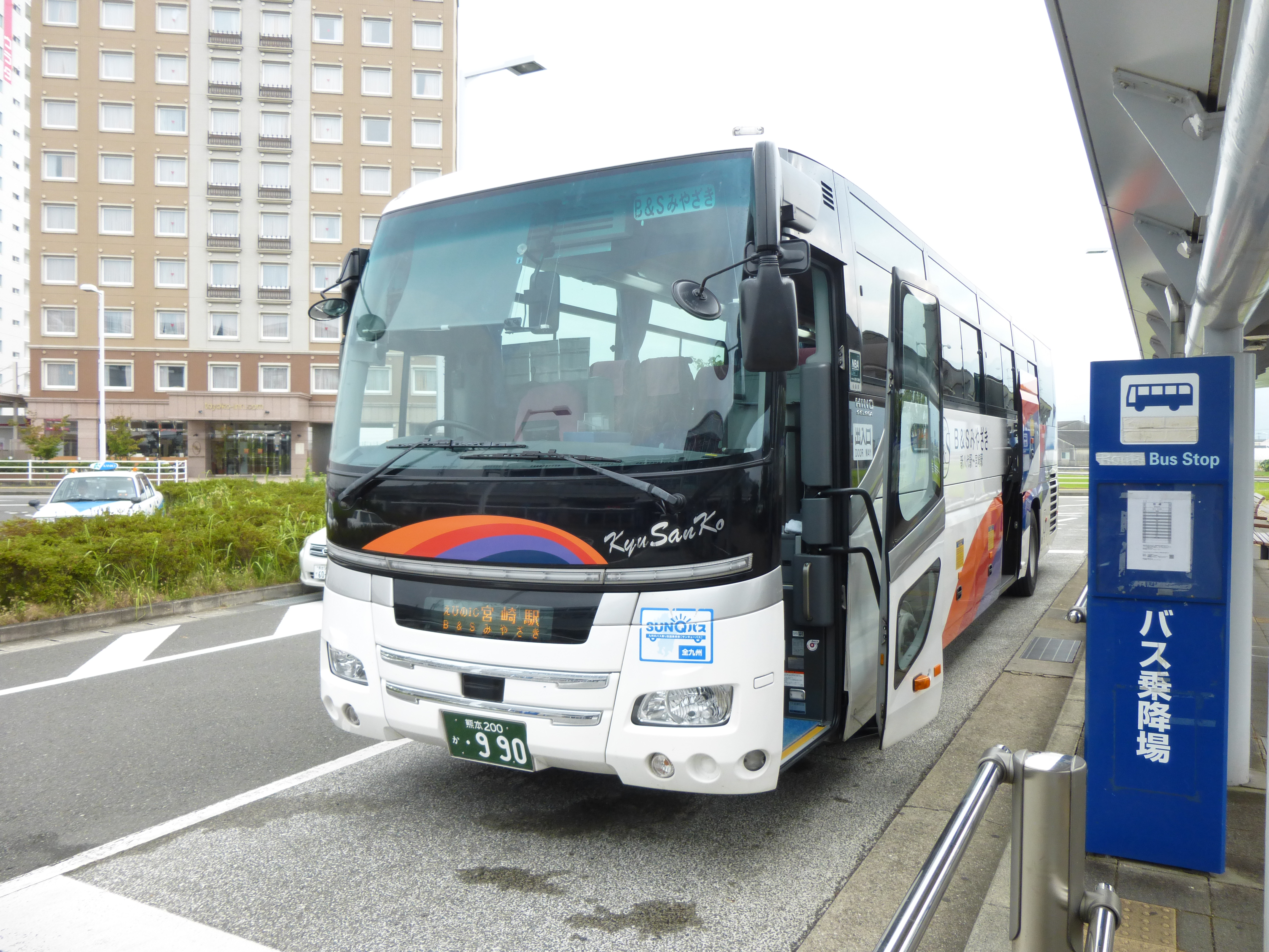 "B&S MIYAZAKI gō" Shinyatusiro to Miyazaki